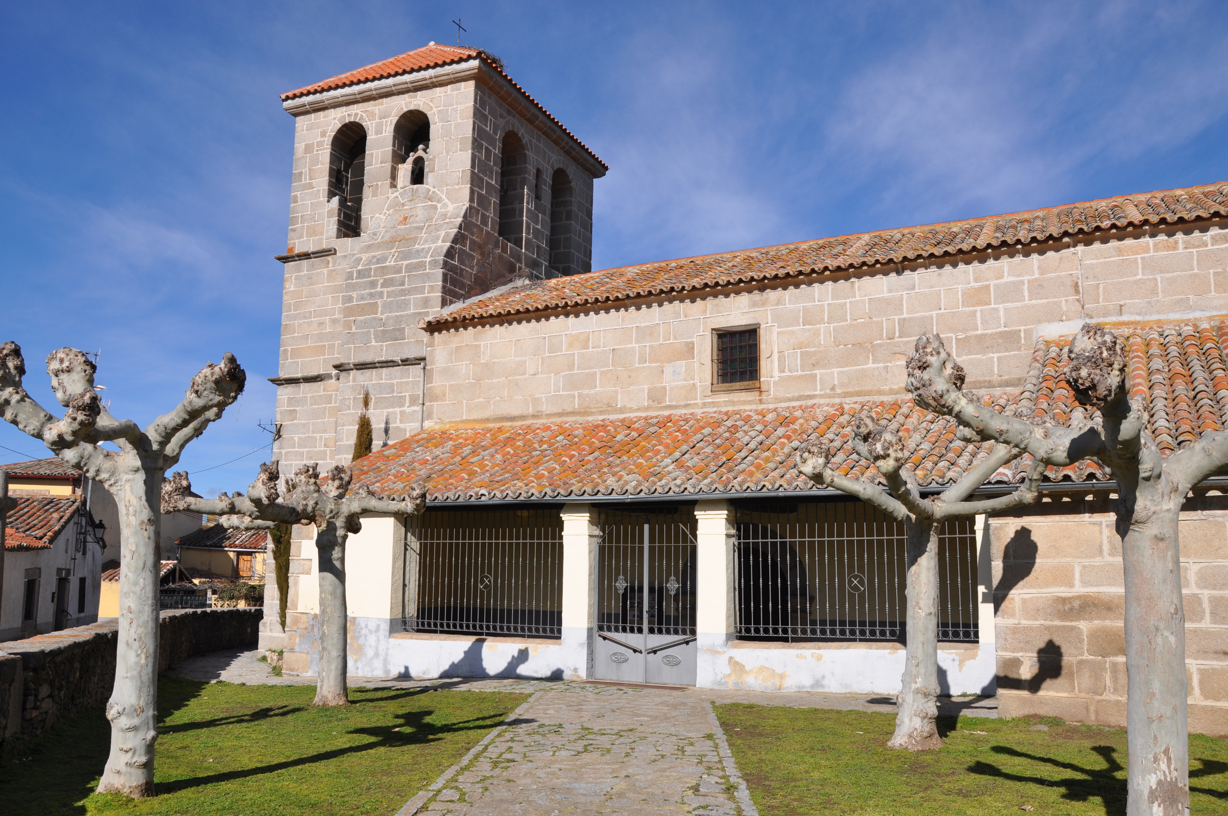 Iglesia de santo Tomás apóstol, Martínez, Ávila, España